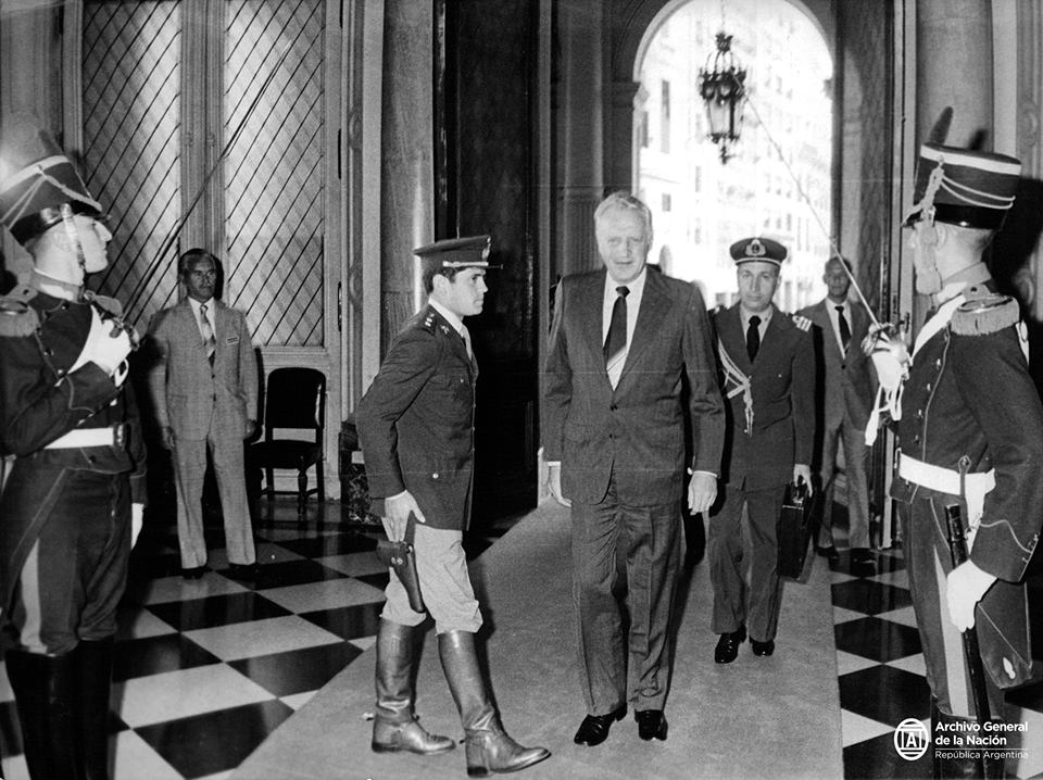 Galtieri entrando a la casa de gobierno. Documentos Fotográficos. Inventario 336666.